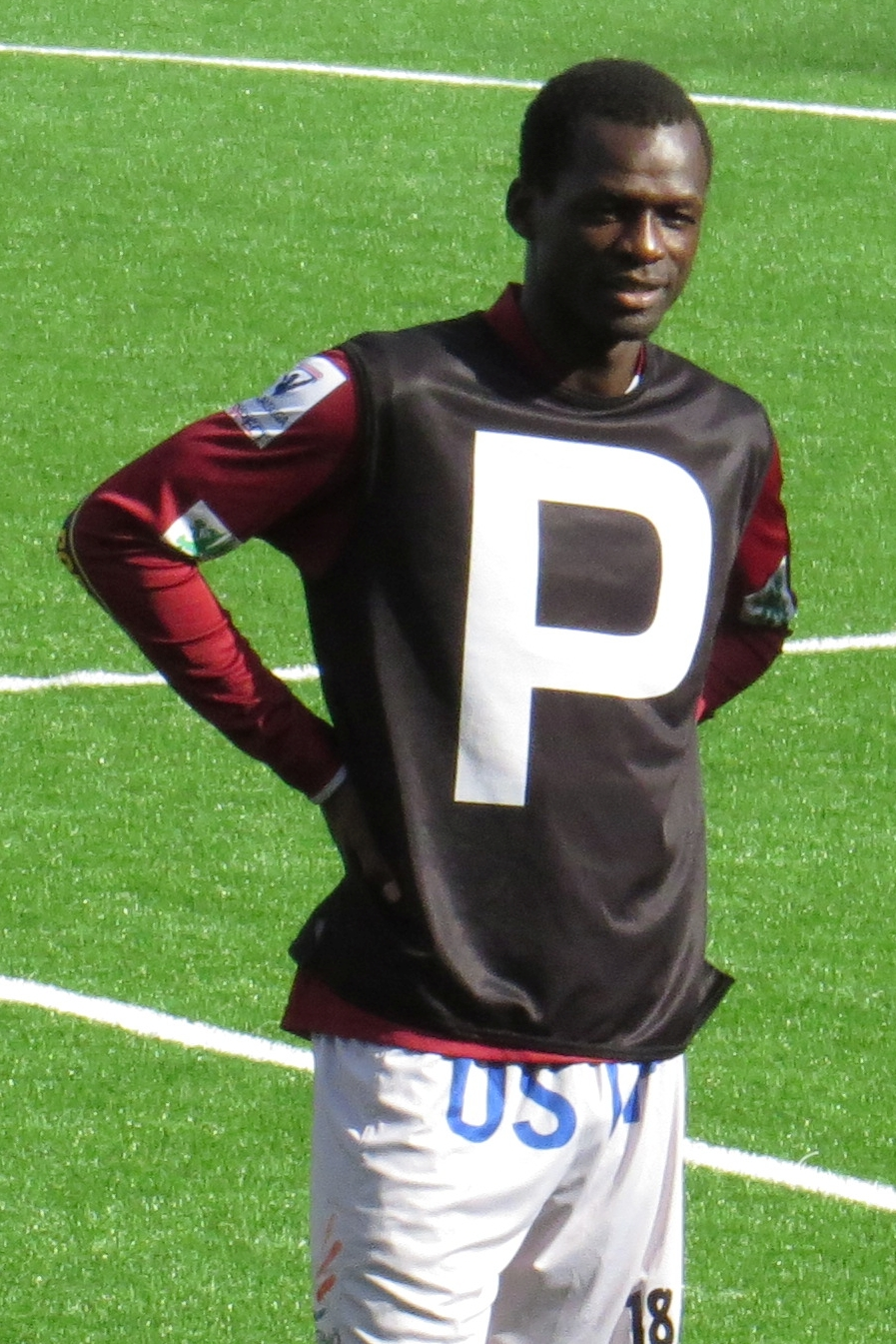 Peter Opiyo, kenialainen jalkapalloilija FF Jaron joukkueessa kaudella 2015.